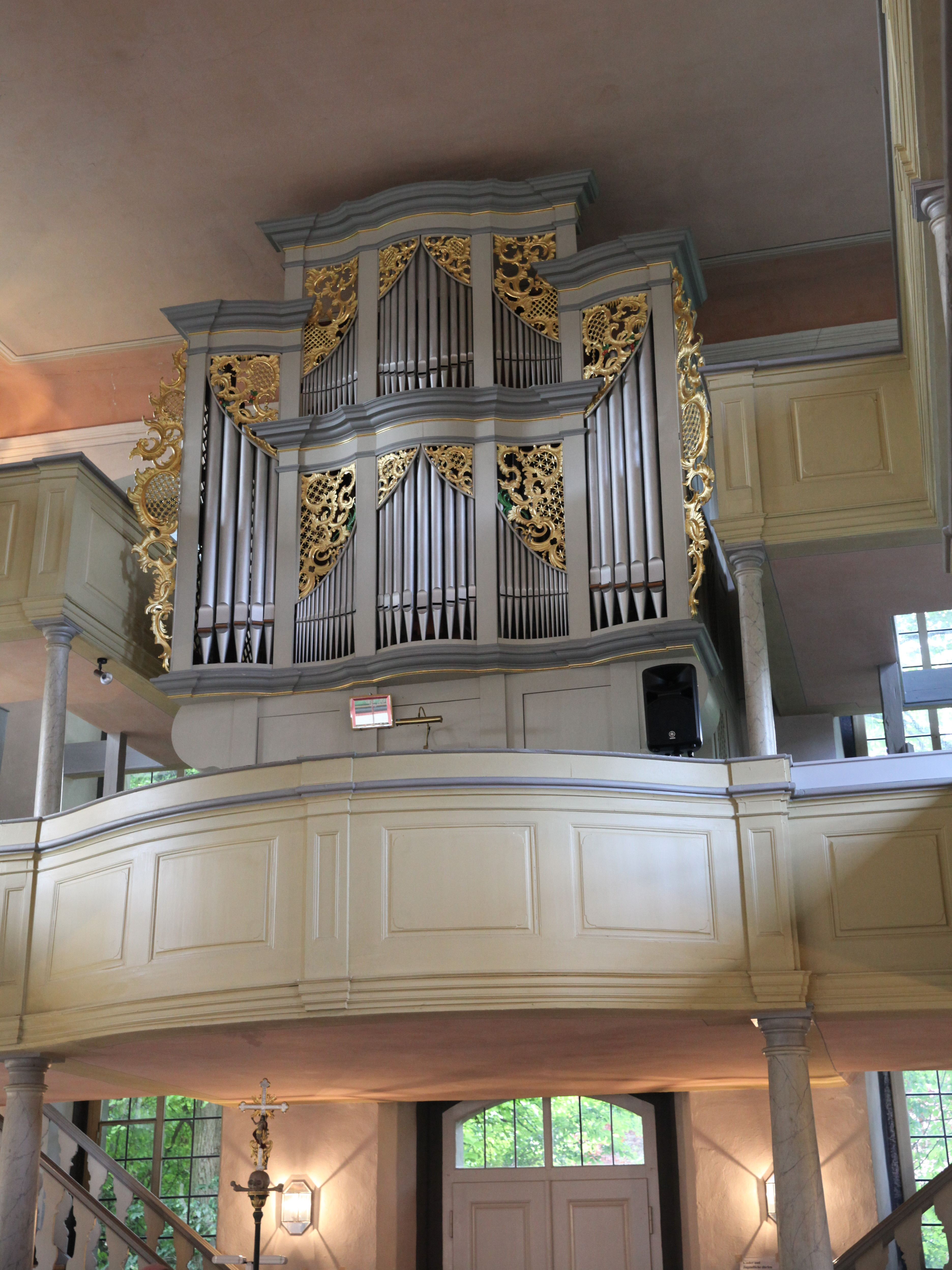 Orgel, evangelisch-lutherische Dreifaltigkeitskirche in Weißenbrunn vorm Wald